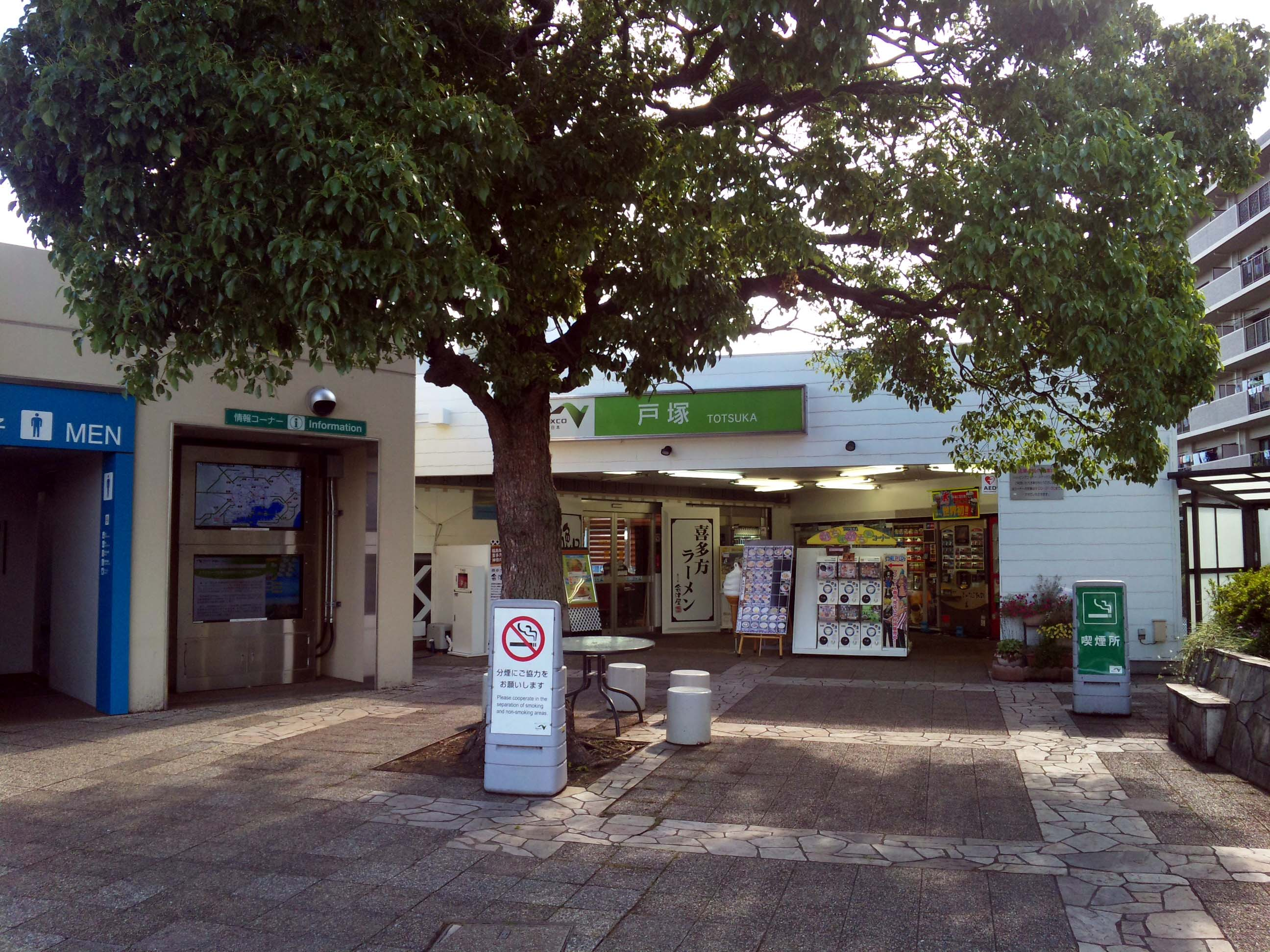 横浜新道ja:戸塚パーキングエリアNTTドコモSH-02Bにて撮影